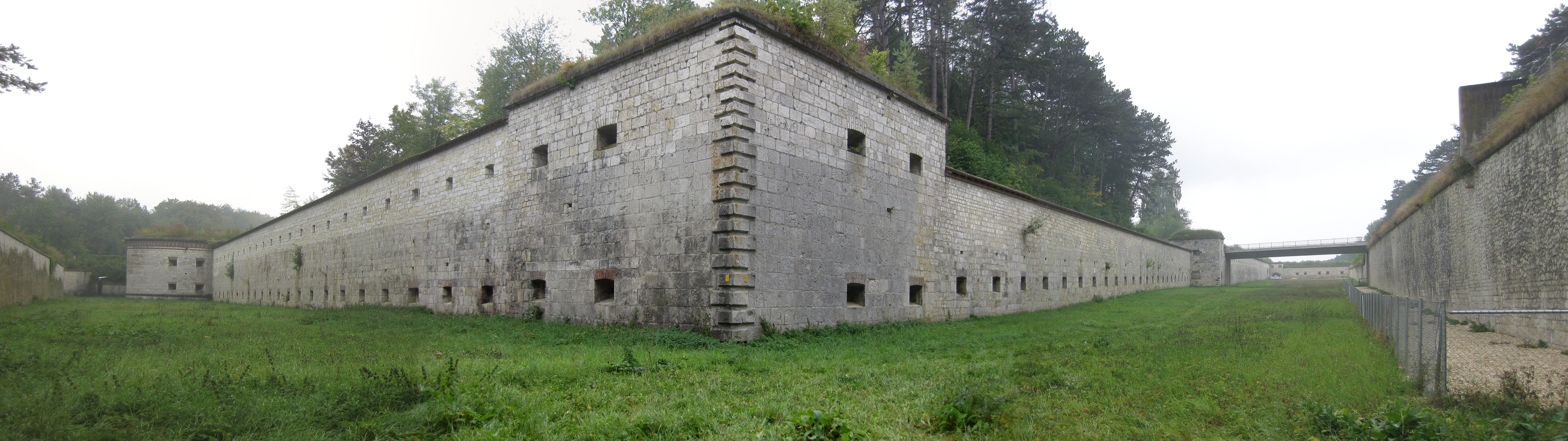 Der Wilhelmsburg vorgelagert ist die heute von der Bundeswehr genutzte Wilhelmsfeste.mit den Werken XIII bis XVII. Links im Hintergrund ist der Flankenturm von Werk XVI, rechts im Hintergrund die Secondeflanke von Werk XVI und dahinter die große Caponniere von Werk XV zu erkennen.